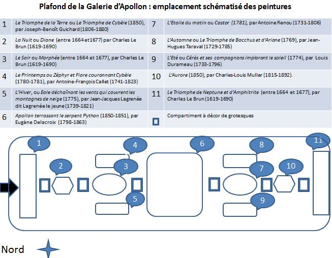 Schéma simplifié de l'emplacement des peintures du plafond de la galerie d'Apollon Musée du Louvre Paris